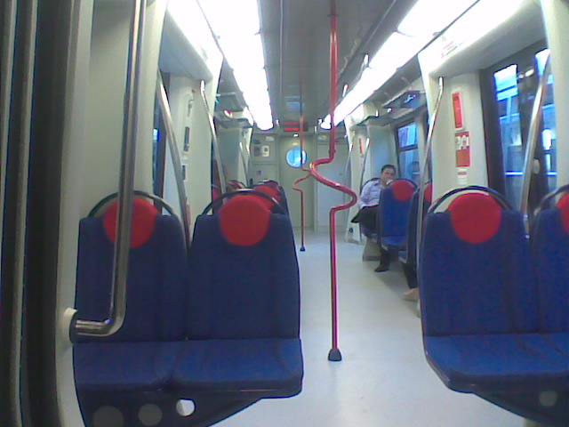 Foto dell'interno del treno ETR 200 Metrostar